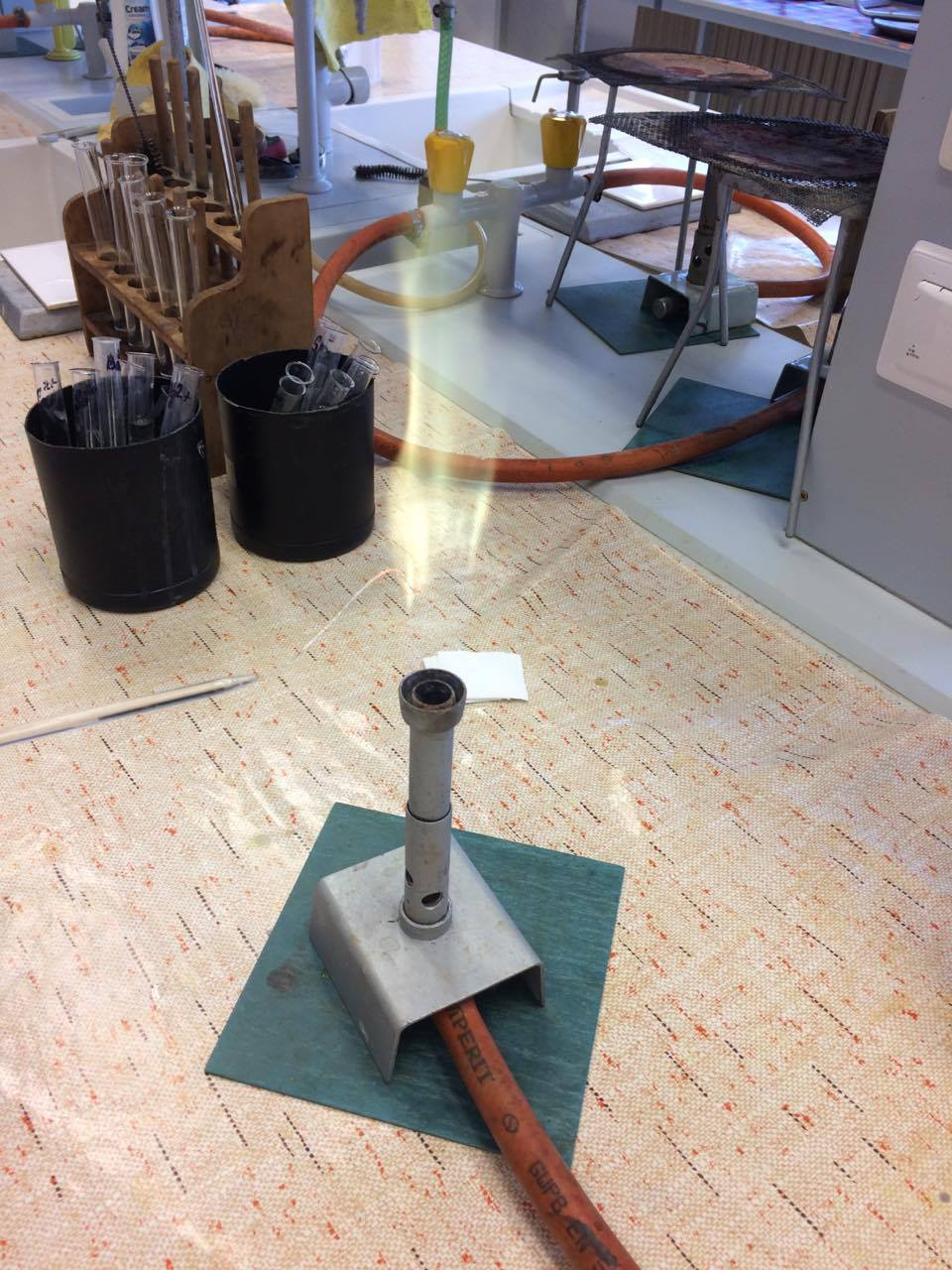 Fotografie z hodiny Laboratorního cvičení analytické chemie Střední průmyslová škola chemická Pardubice